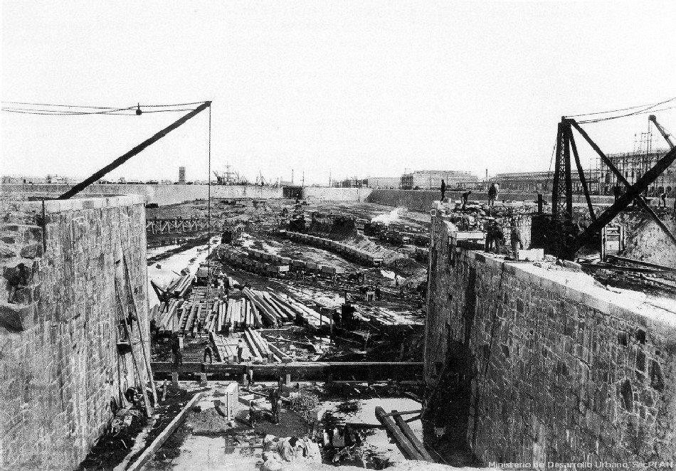 Vista de la construcción del Dique 2 de Puerto Madero en Buenos Aires, desde uno de los puentes que lo conecta con la ciudad. Se desconoce el autor, y la foto es de alrededor del año 1891.